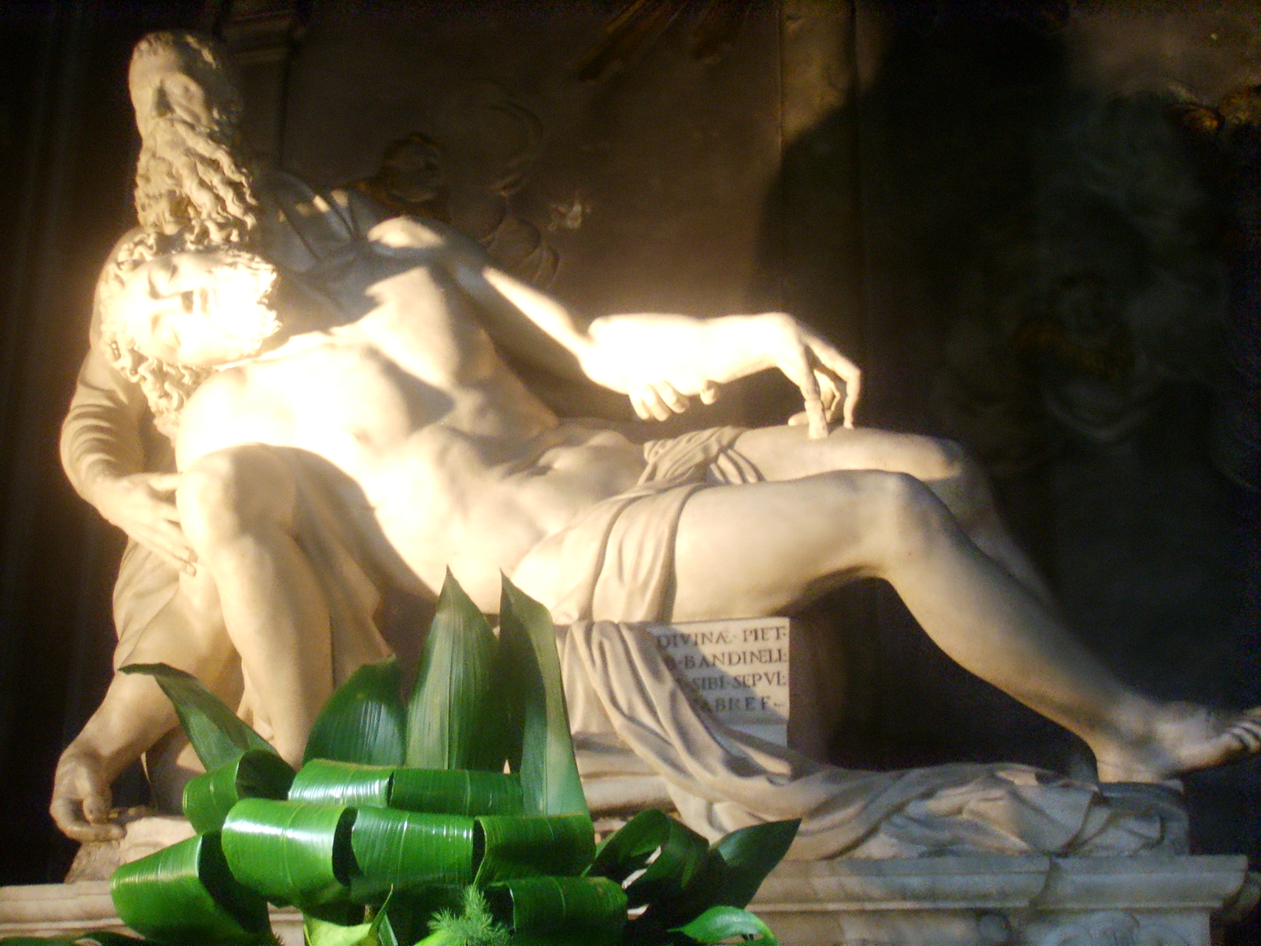 Santissima annunziata Pietà by Baccio Bandinelli in Florence, italy